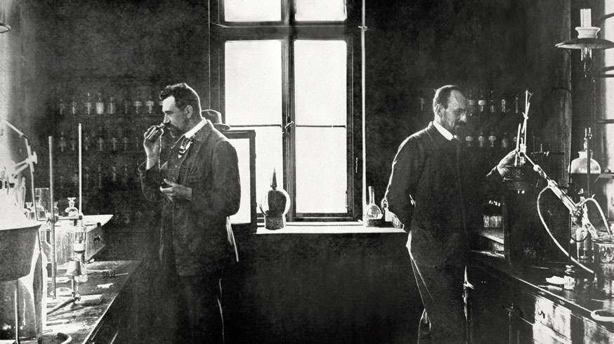 Karl Reimer (* 25. Dezember 1845 in Leipzig; † 15. Januar 1883 in Berlin) Wilhelm Haarmann (* 24. Mai 1847 in Holzminden; † 6. März 1931 in Höxter)